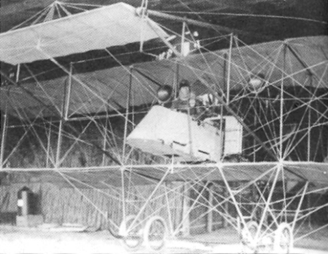 Поручик Радул Милков на борда на Албатрос Допелтраубе